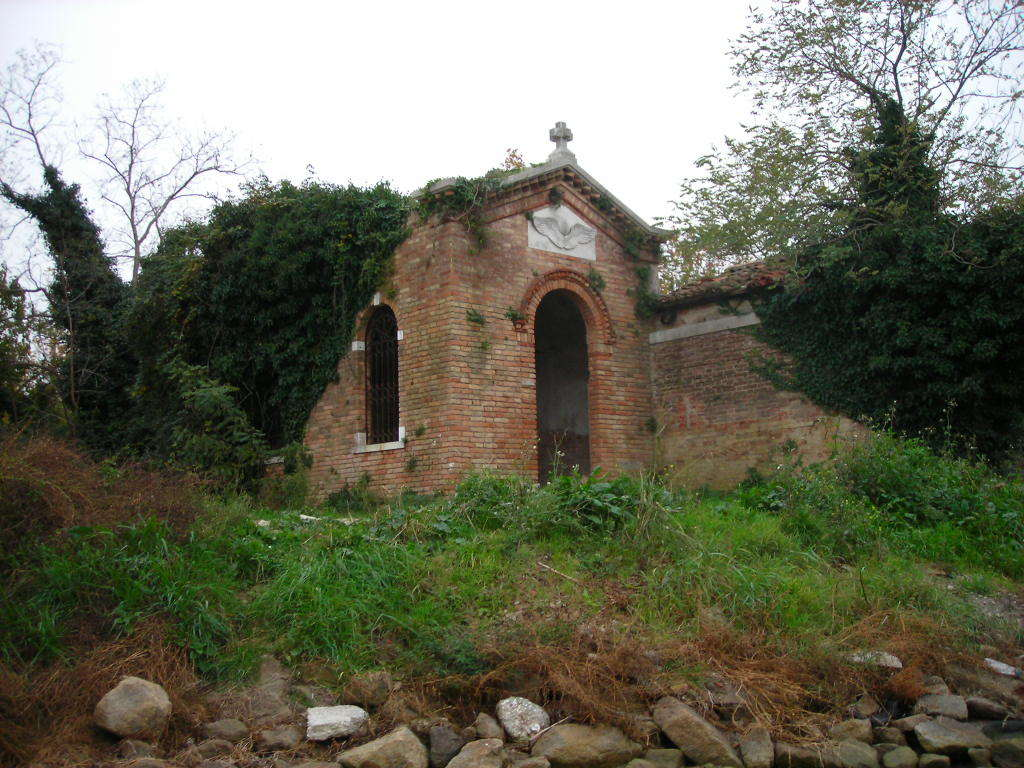 Isola di Poveglia